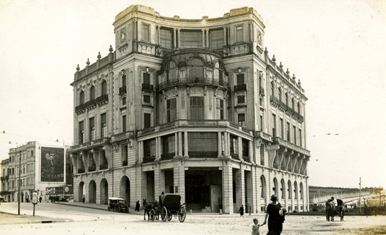 Vista del edificio del Club Mar del Plata, club social de la elite que veraneaba en el balneario a comienzos del siglo XX. Fue inaugurado el 23 de enero de 1910, y se incendió en 1961, siendo luego demolido. Se encontraba en Avenida Pedro Luro y Boulevard Marítimo, donde hoy existe una plazoleta.